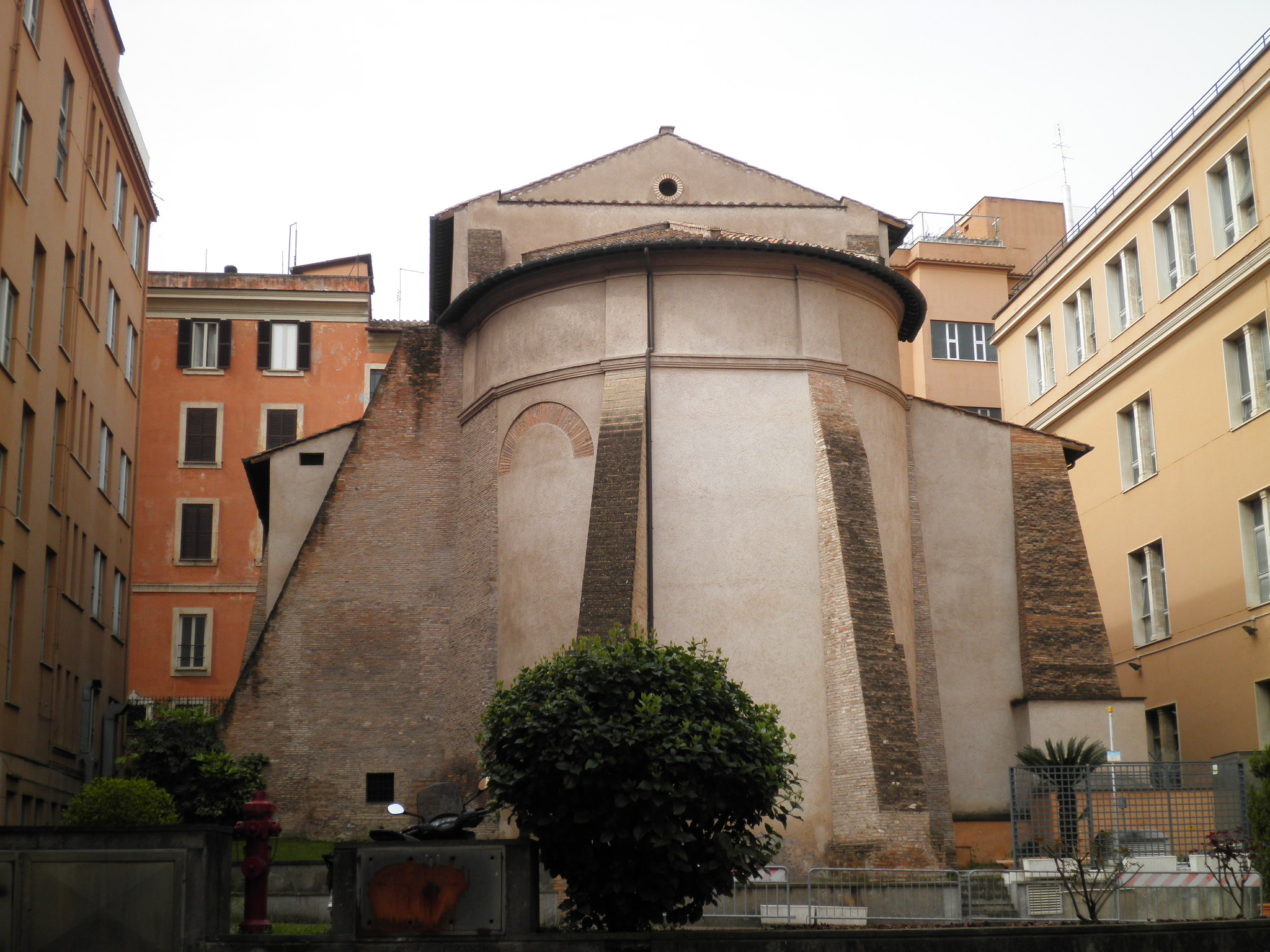 Roma, abside di Sant'Agata dei Goti su via dei Serpenti